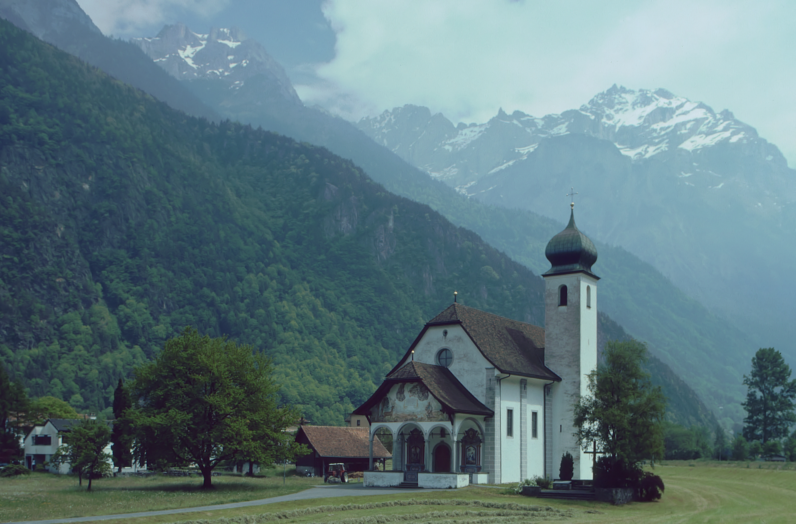 Jagdmattkapelle in Erstfeld auf der rechten Seite der Reuss; Kanton Uri/Zentralschweiz